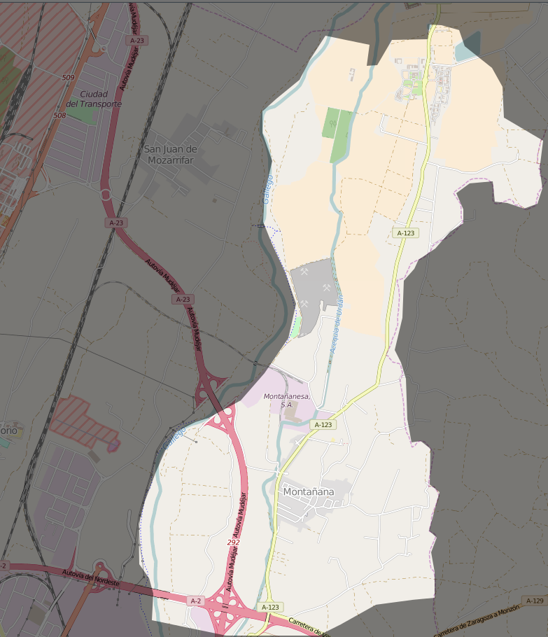 Mapa del distrito de Montañana en Zaragoza.